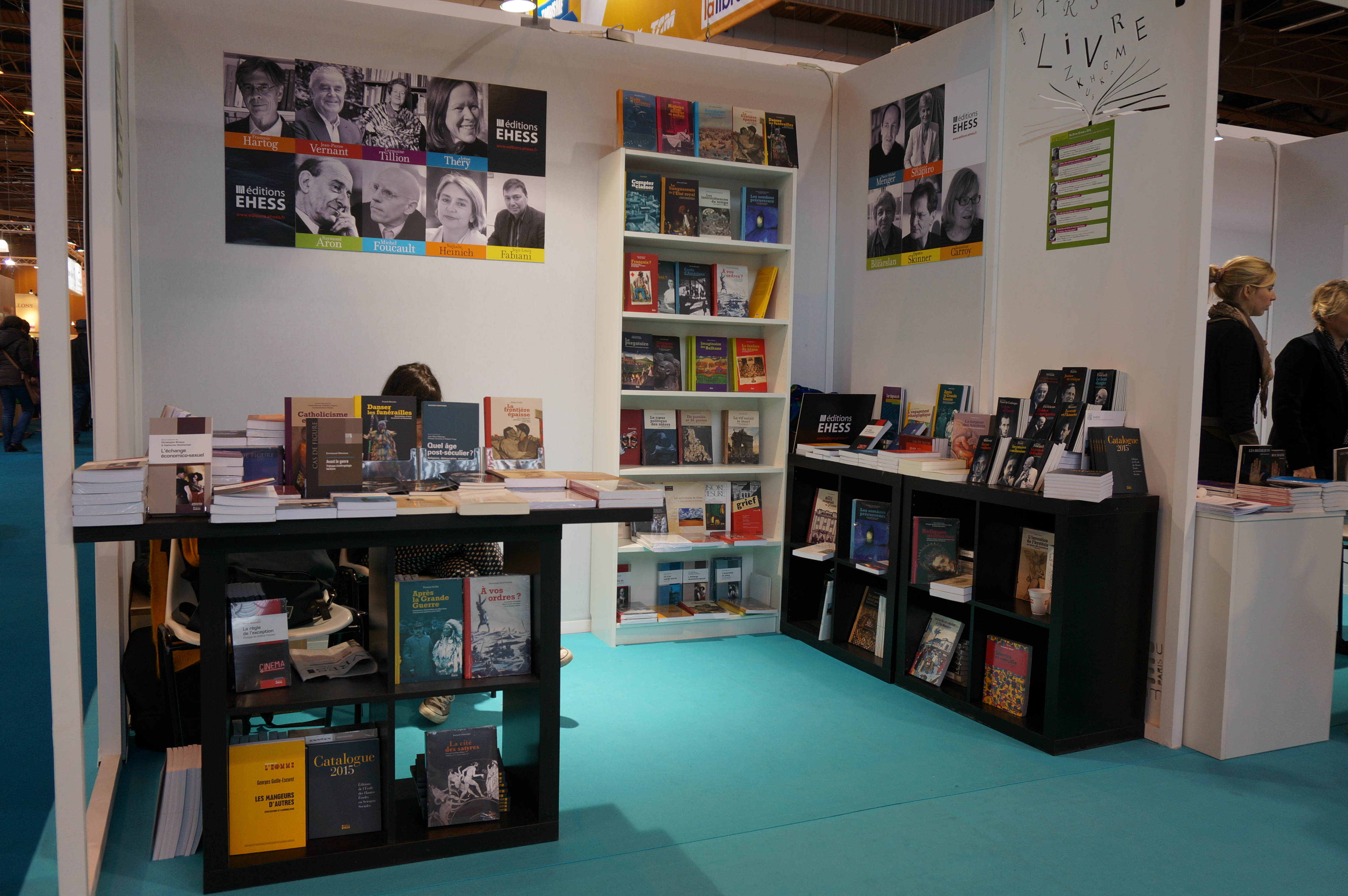 lors du salon du livre de 2015.